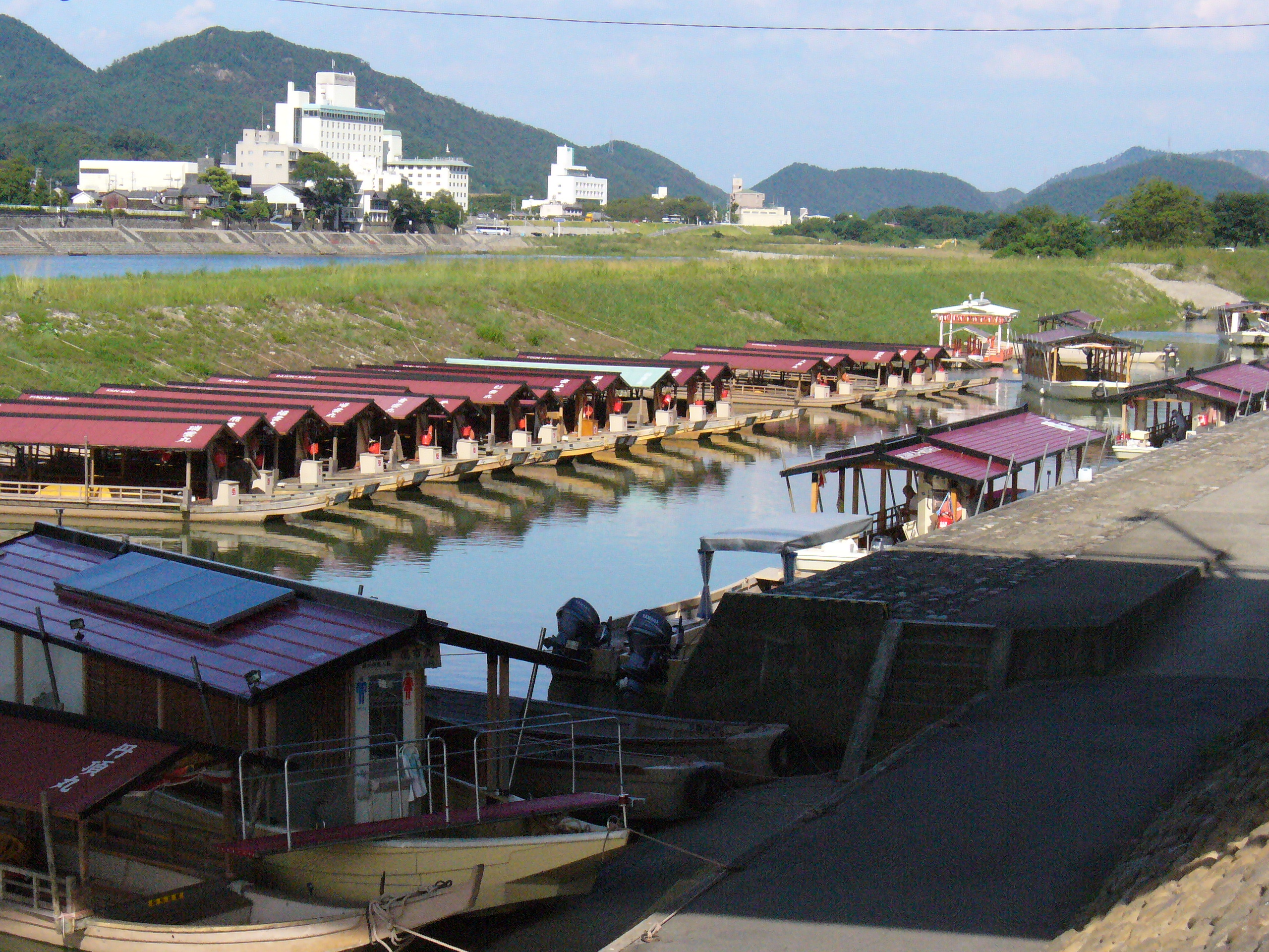 Ukai Nagaragawa（長良川鵜飼）,Gifu,Gifu(岐阜県岐阜市)で撮影。長良橋下の川辺で待機する鵜飼観覧舟（手前には御手洗舟の姿も）